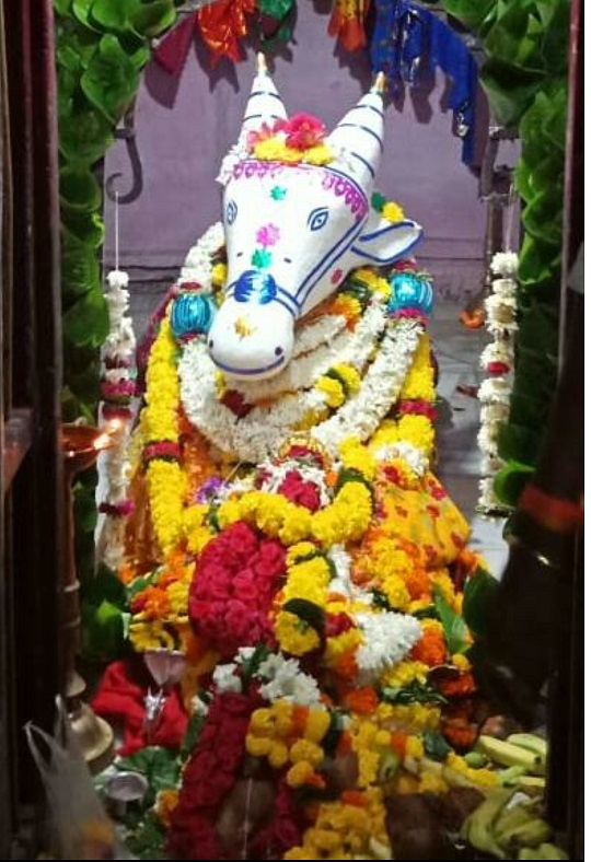 ಕನ್ನಡ: ಚಚಡಿ ಗ್ರಾಮದ ಮುಖ್ಯ ದೇವರು ಸಂಗಮ ಬಸವ